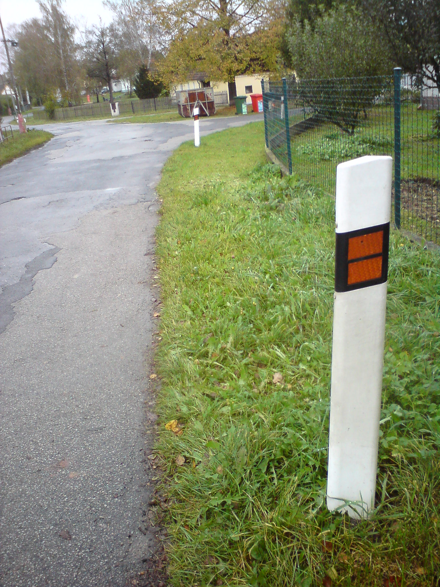 Směrový sloupek (přední část)